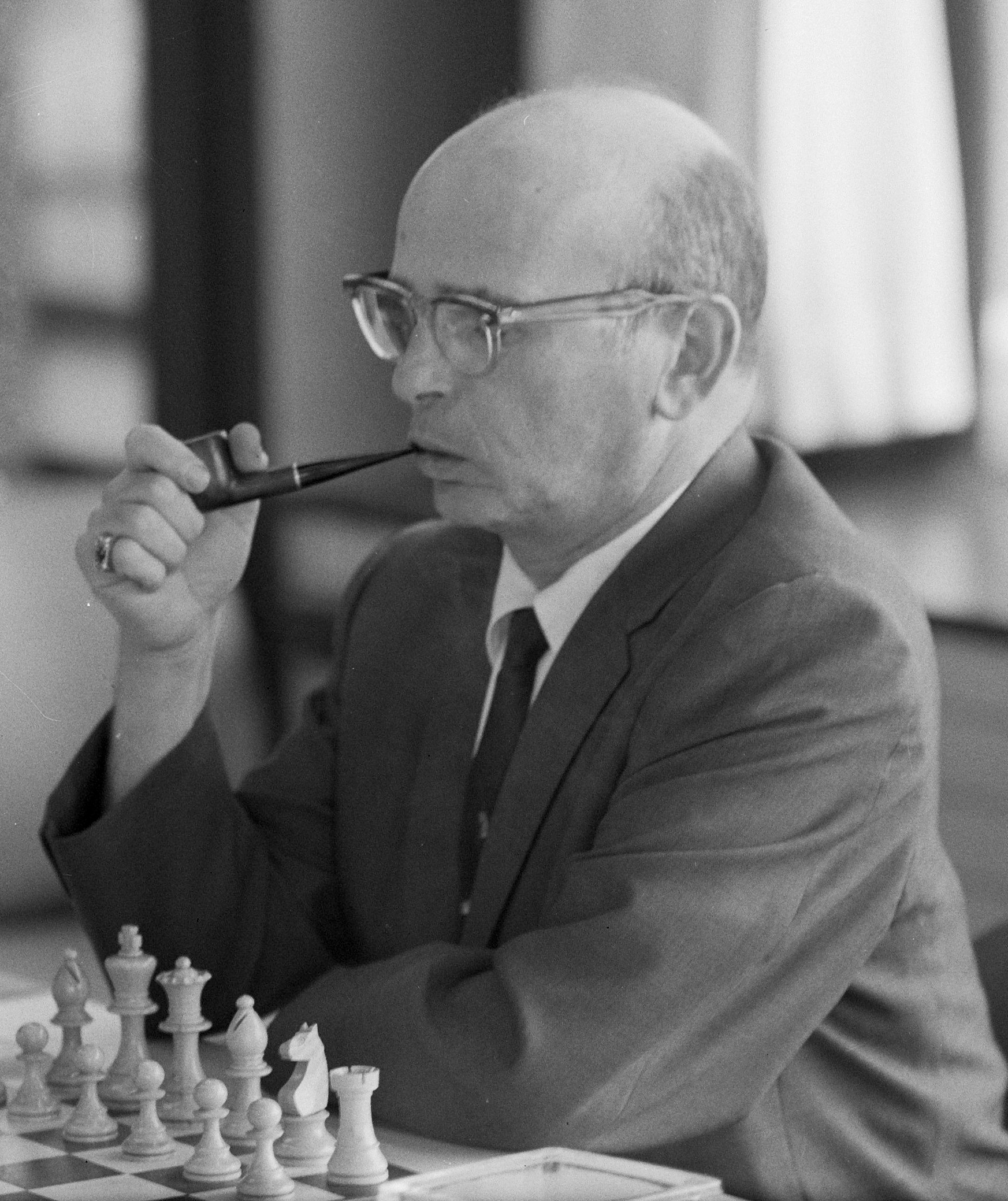 Collectie / Archief : Fotocollectie Anefo Reportage / Serie : [ onbekend ] Beschrijving : Beslissingswedstrijd schaken begonnen in GAK, Reshevsky voor het bord Datum : 25 juni 1964 Trefwoorden : SCHAKEN Instellingsnaam : GAK Fotograaf : Nijs, Jac. de / Anefo Auteursrechthebbende : Nationaal Archief Materiaalsoort : Negatief (zwart/wit) Nummer archiefinventaris : bekijk toegang 2.24.01.03 Bestanddeelnummer : 916-5873